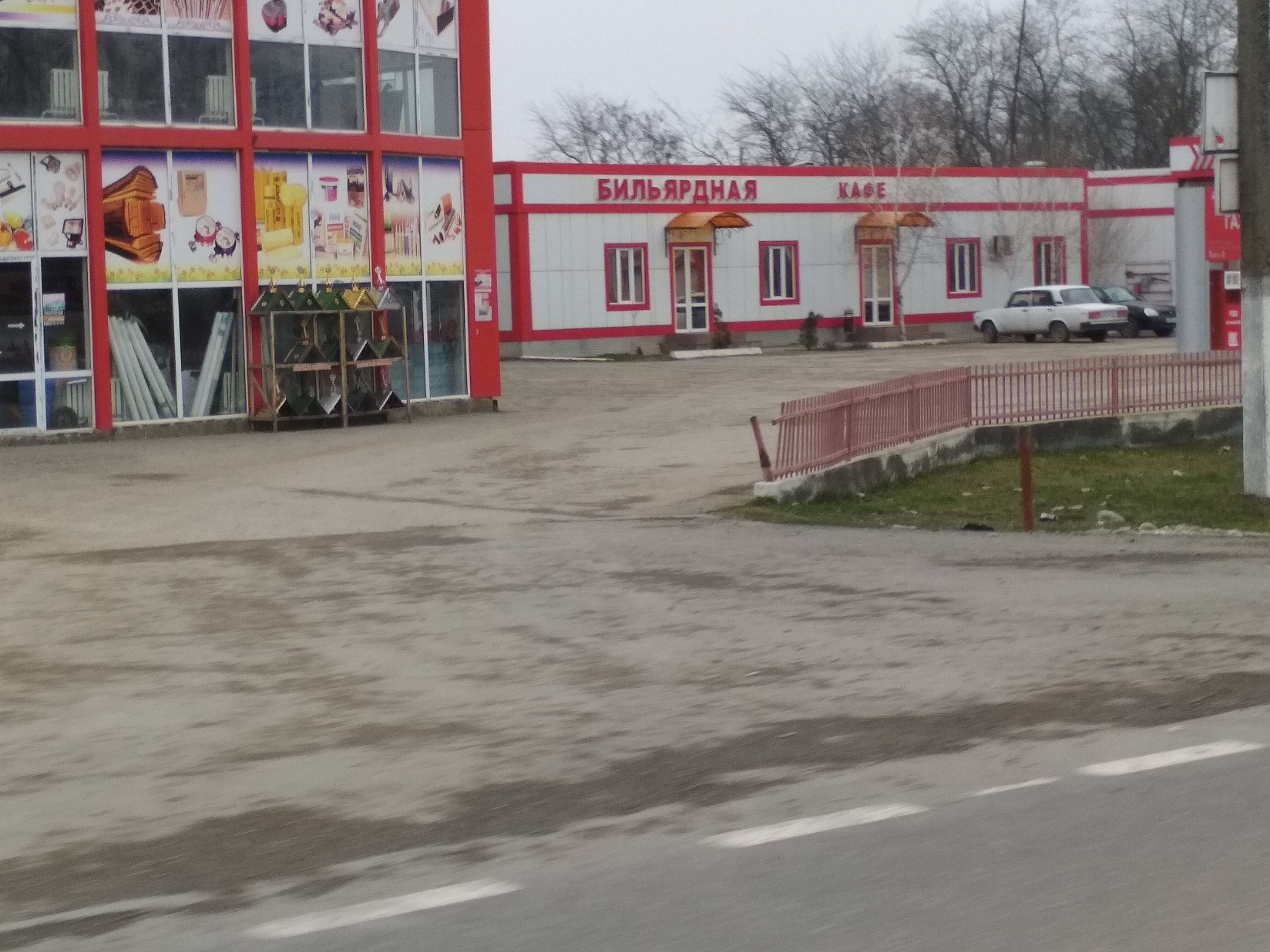 Нохчийн: Комплекс ТО в Новотерском